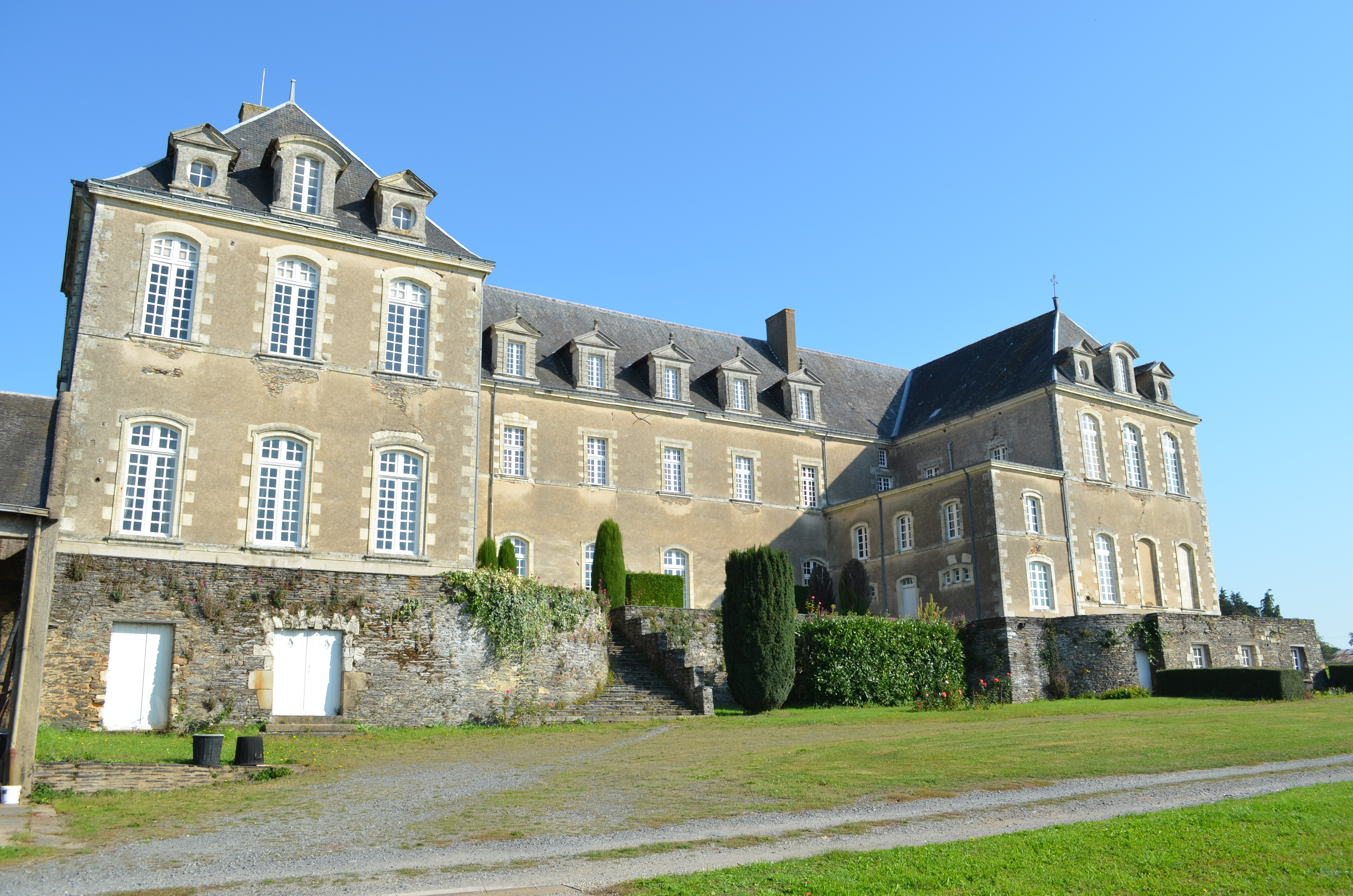 Abbaye Notre-Dame de Melleray - La Meilleraye-de-Bretagne (Loire-Atlantique) This building is en partie classé, en partie inscrit au titre des Monuments Historiques. .